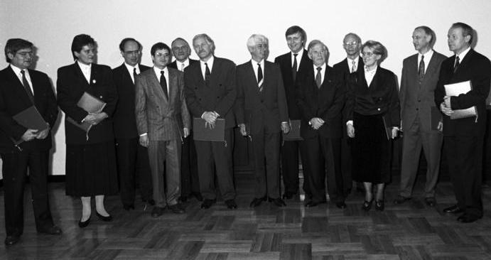 Dresden, Kabinett des Freistaat Sachsen ADN/Matthias Hiekel/ 8.11.90 Dresden: Kabinett Der Freistaat Sachsen hat seit heute eine vereidigte Staatsregierung. Dem Kabinett gehören an (v.l.n.r., ab 3. Person): Dr. Hans Geisler, Minister für Soziales, Gesundheit und Familie; Arnold Vaatz, Chef der Sächsischen Staatskanzlei im Range eines Ministers; Dr. Karl Weise, Minister für Umwelt und Landesentwicklung; Dr. Rudolf Krause, Innenminister; Dr. Rolf Jähnichen, Minister für Landwirtschaft, Ernährung und Forsten; Dr. Kajo Schommer, Minister für Wirtschaft und Arbeit; Prof. Dr. Kurt Biedenkopf, Ministerpräsident; Prof. Hans-Joachim Meyer, Wissenschaftsminister; Stefanie Rehm, Kultusminister; Steffen Heitmann, Justizminister; Prof. Dr. Georg Milbradt, Finanzminister. Abgebildete Personen: Geisler, Hans Dr.: Volkskammerabgeordneter, Demokratischer Aufbruch (DA), DDR (GND 122664884) Vaatz, Arnold: Minister, Chef der Sächsischen Staatskanzlei, Bundesrepublik Deutschland (GND 114205256) Weise, Karl Dr.: 1990 Minister für Umwelt und Landesentwicklung in Sachsen, DDR (GND 1118104366) Jähnichen, Rolf Dr.: Minister für Landwirtschaft, Ernährung und Forsten Sachsen, CDU, Bundesrepublik Deutschland (GND 171441915) Krause, Rudolf: 1990 Innenminister, Sachsen, CDU, DDR (GND 1163343862) Schommer, Kajo Dr.: 1990 Minister für Wirtschaft und Arbeit des Freistaates Sachsen, Bundesrepublik Deutschland (GND 112918999) Biedenkopf, Kurt Prof. Dr.: Ministerpräsident von Sachsen, CDU, Bundesrepublik Deutschland (GND 118907956) Meyer, Hans Joachim Prof. Dr.: Minister für Bildung und Wissenschaft, DDR (GND 120569736) Rehm, Stefanie: 1990 Volkskammerabgeordnete, CDU, Kultusministerin, DDR Heitmann, Steffen: Justizminister, Sachsen, Bundesrepublik Deutschland (GND 120408414) Milbradt, Georg: Finanzminister, Ministerpräsident von Sachsen, CDU, Bundesrepublik Deutschland (GND 123329930)